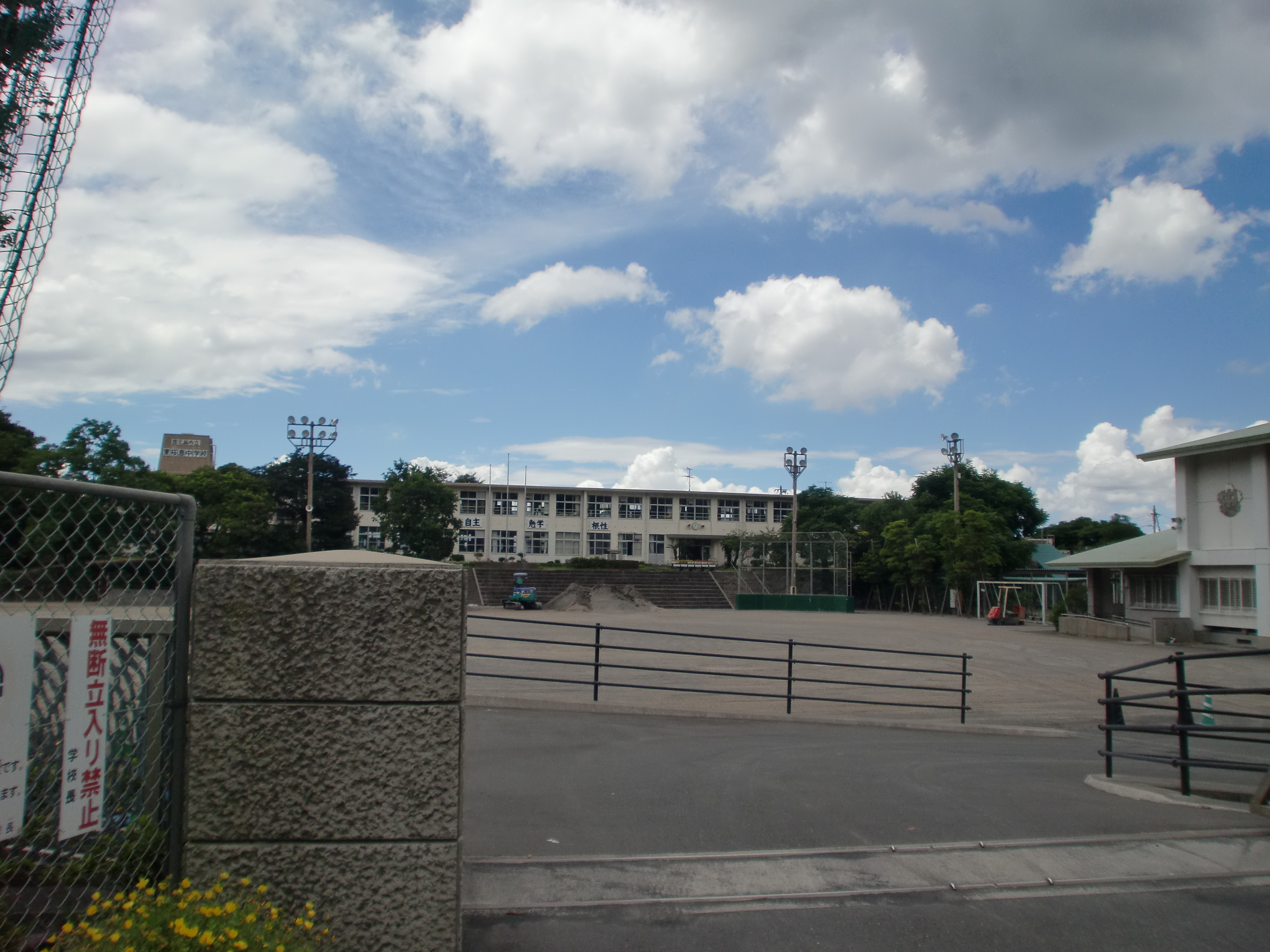 鹿児島市立東桜島中学校の外観。